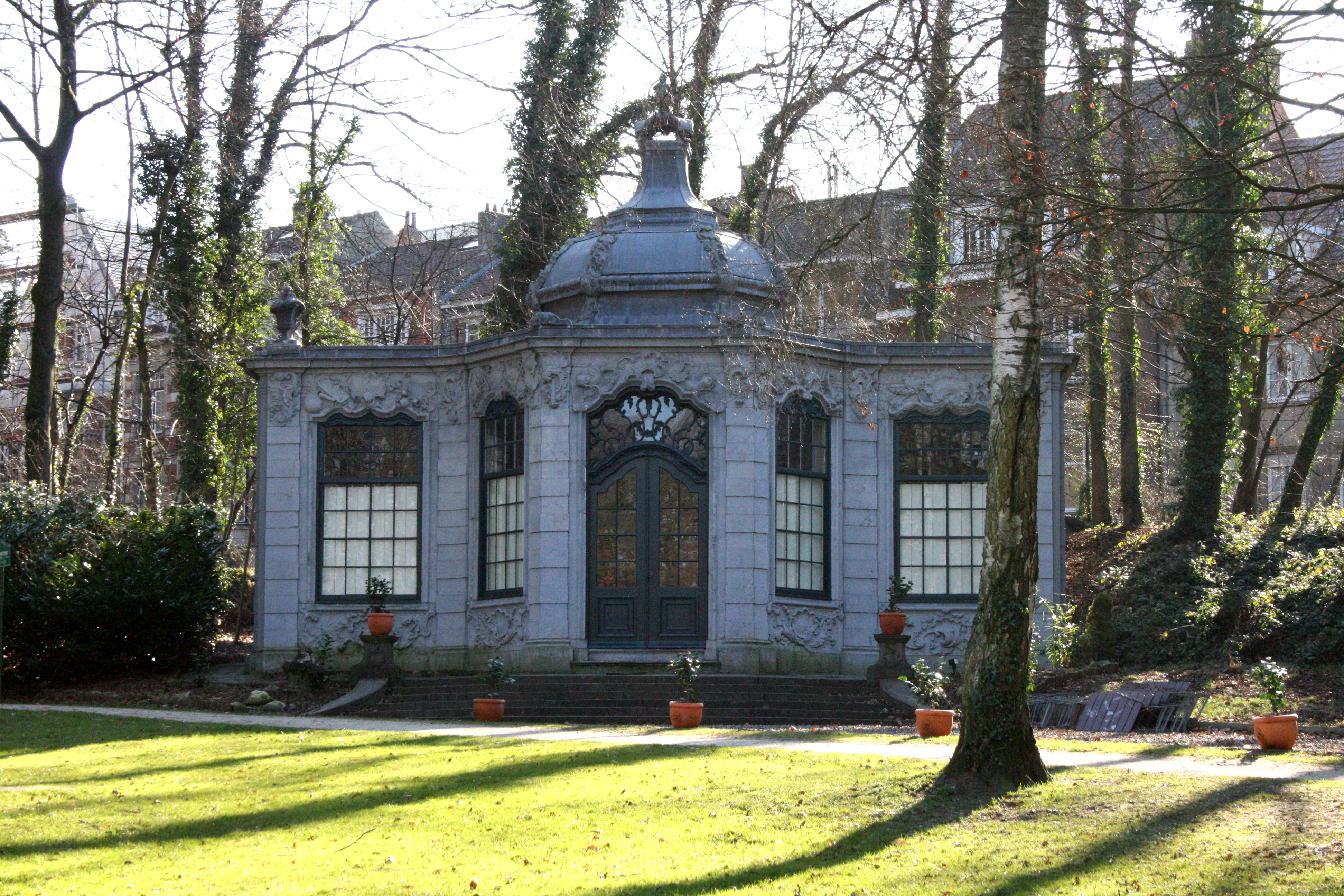 Parc du Wolvendael, Uclle (Bruxelles), Belgique. Pavillon Louis XV.